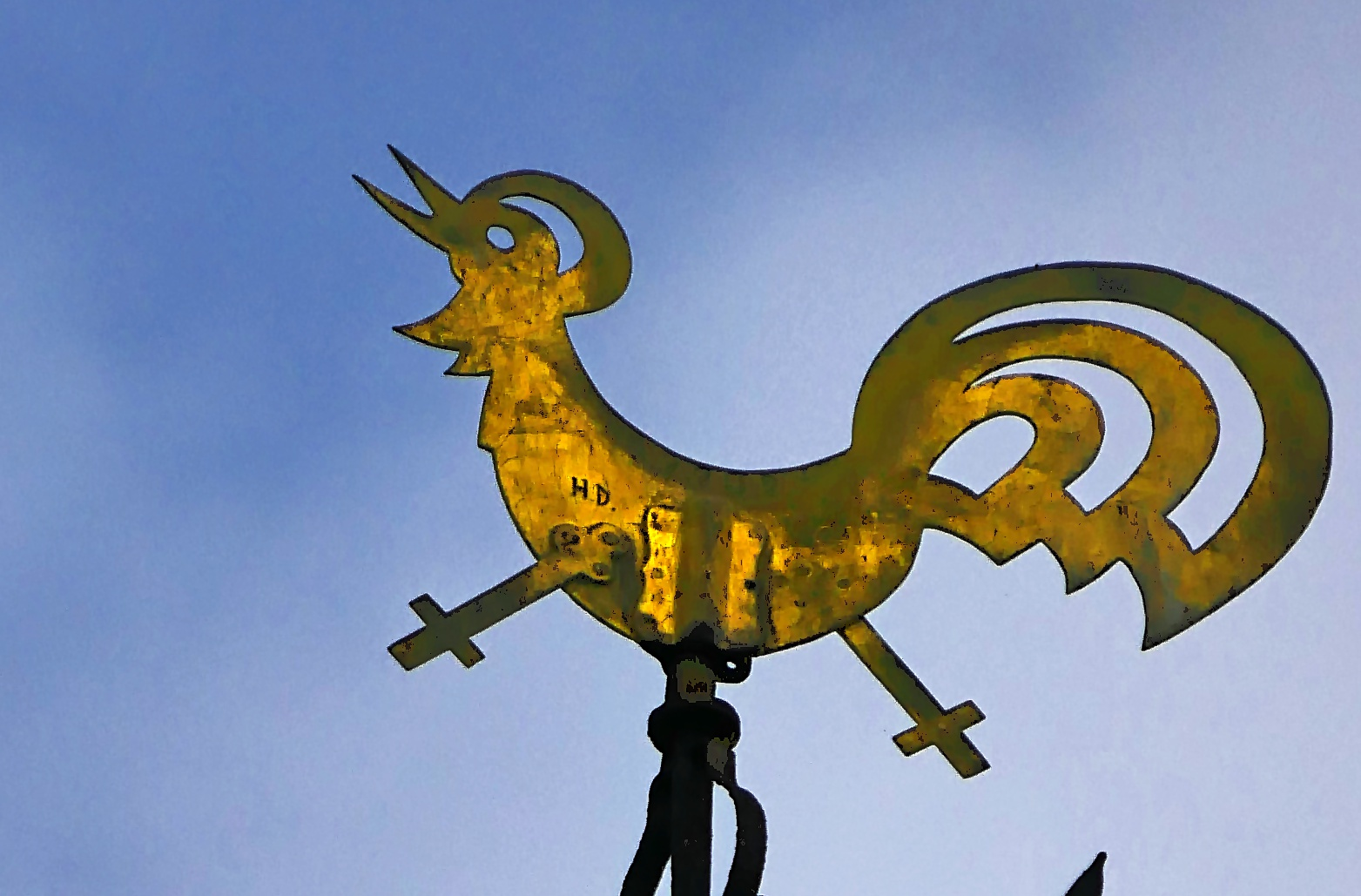 Evangelische Kirche Hirschfeld (Hunsrück) - Wetterhahn auf dem Kirchturm